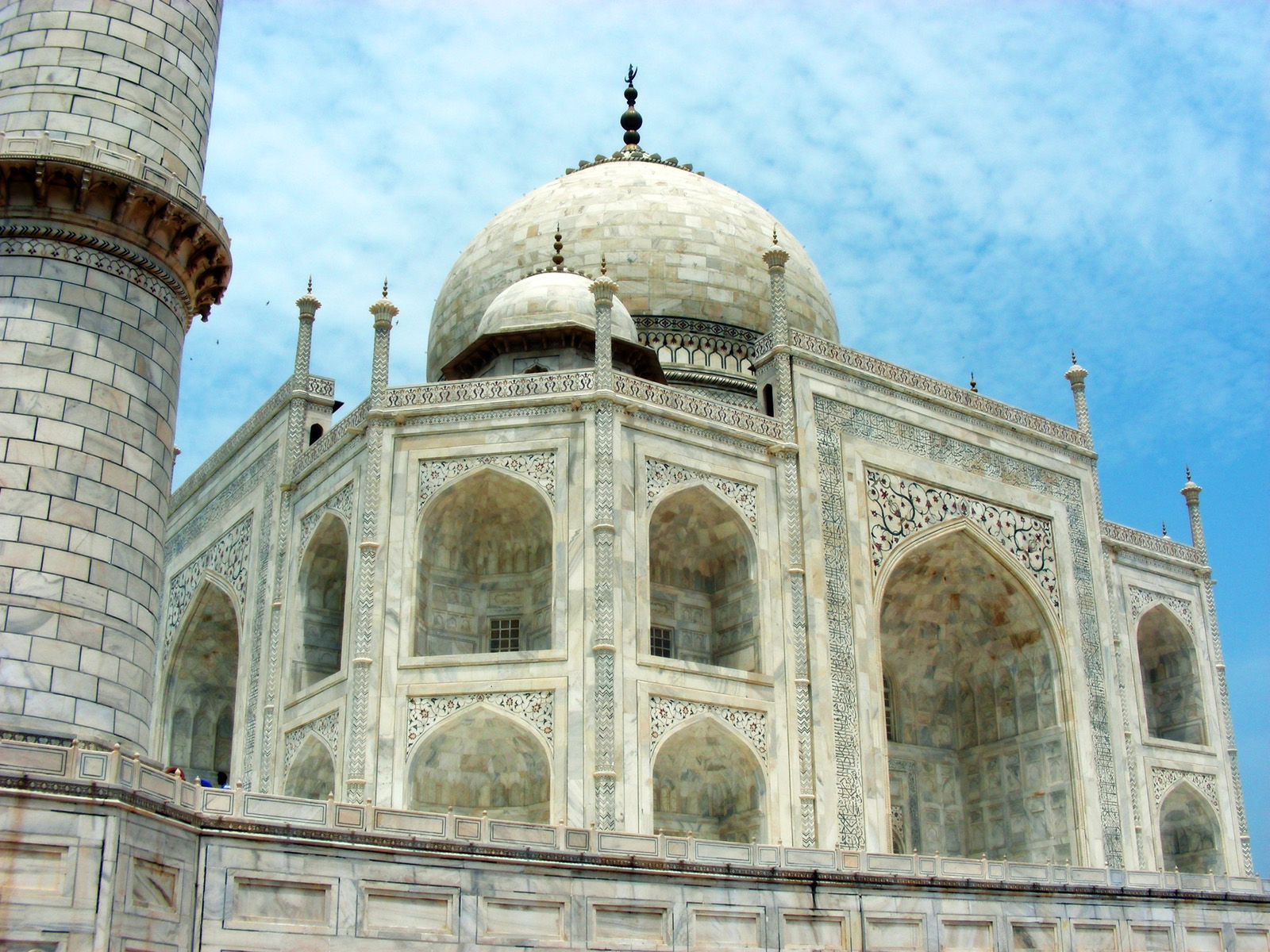 泰姬陵